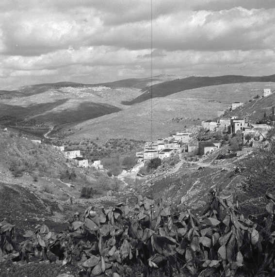 מי נפתוח - ירושלים